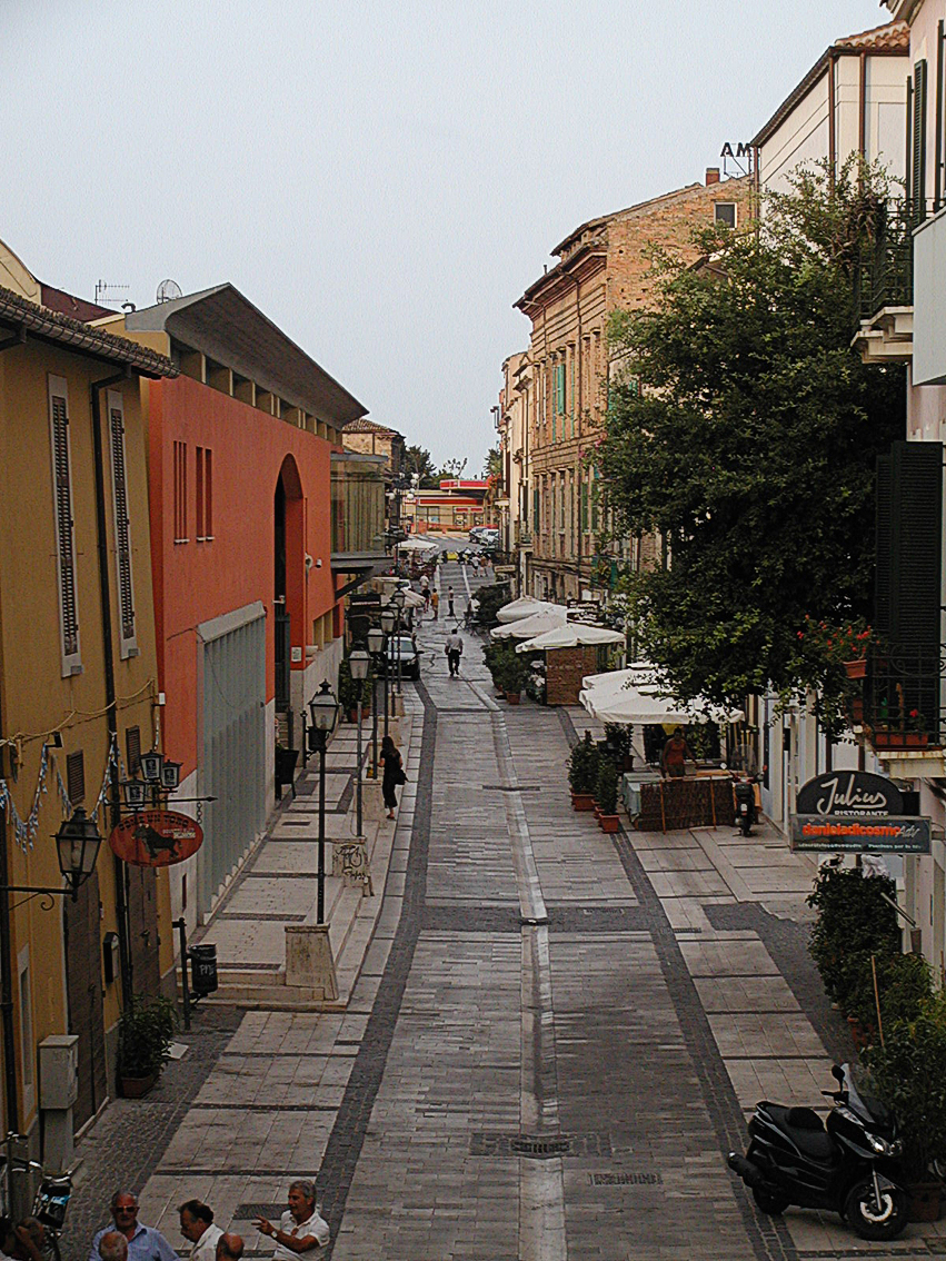 Pescara Centro Storico